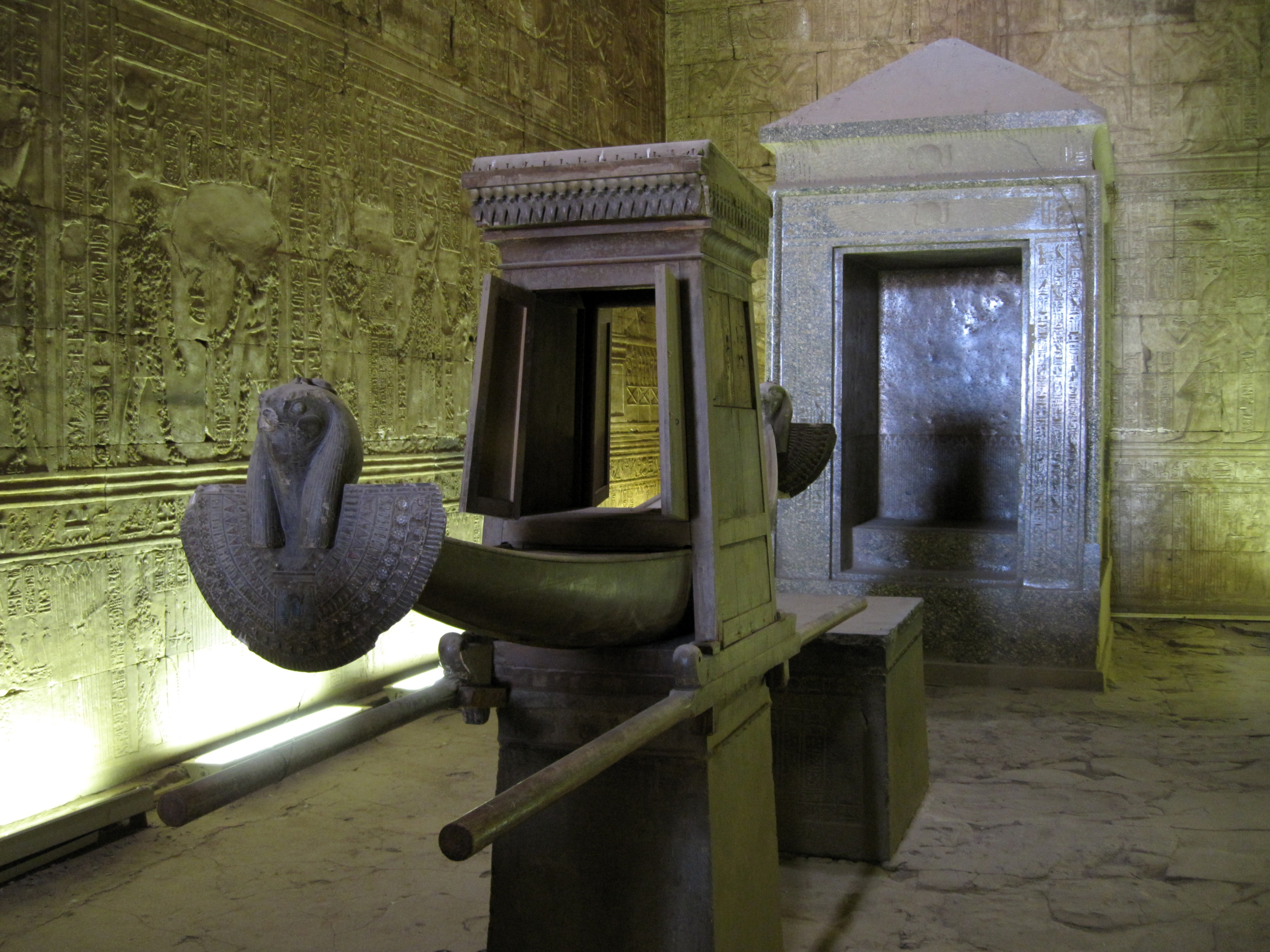 Heiligtum im Tempel von Edfu, Ägypten